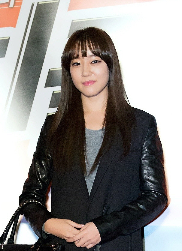 121120-음치클리닉-vip-시사회고우리